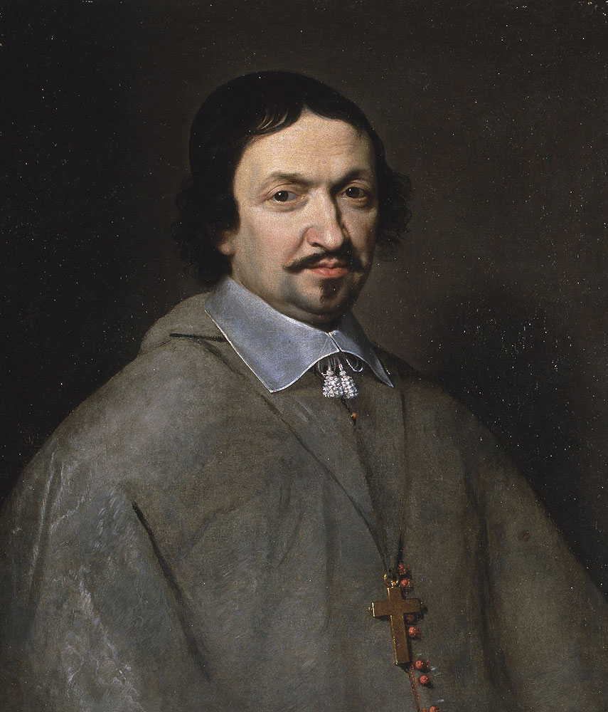 Portrait de Victor le Bouthillier, 1650